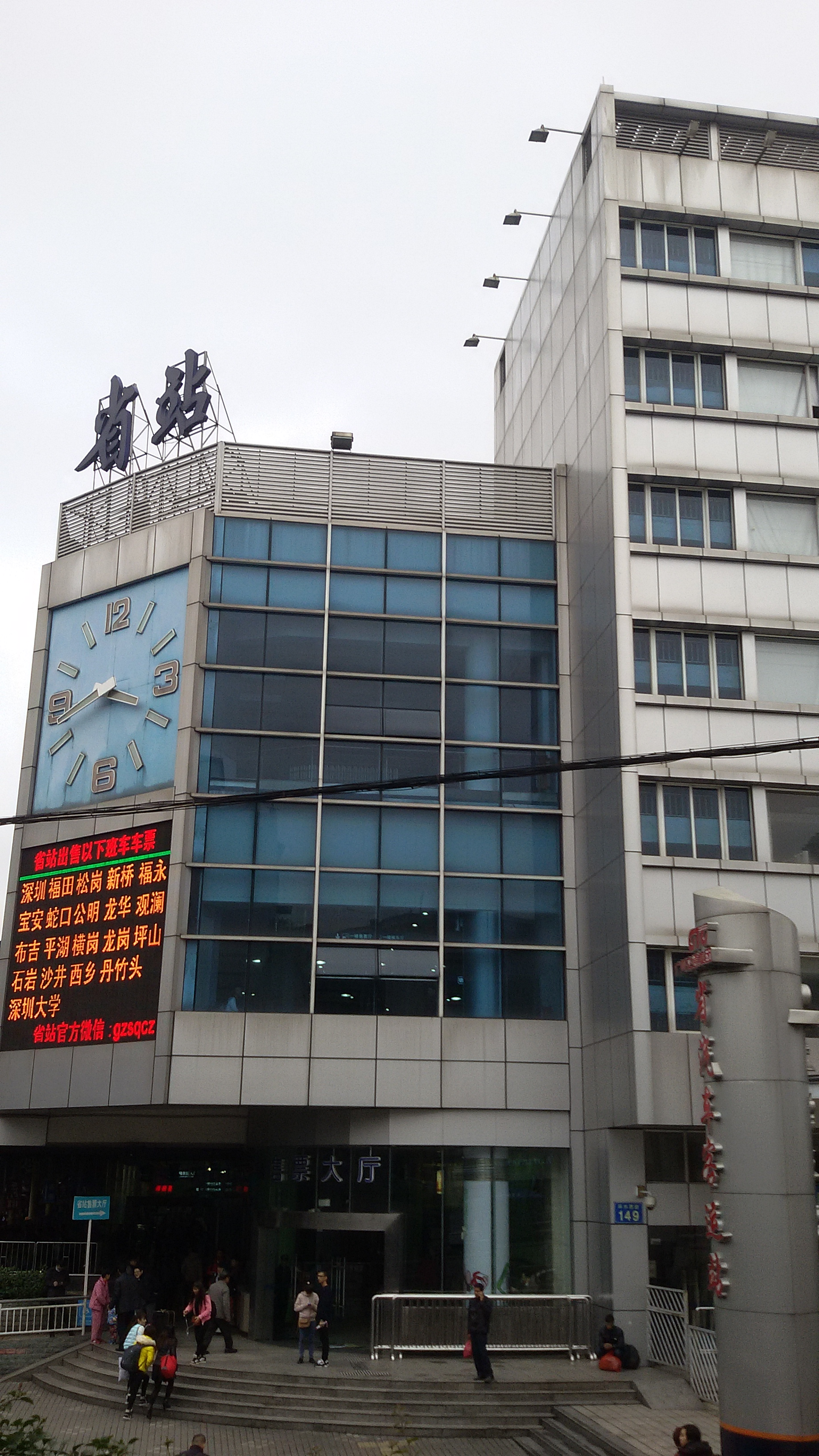 粵語: 廣東省汽車客運站